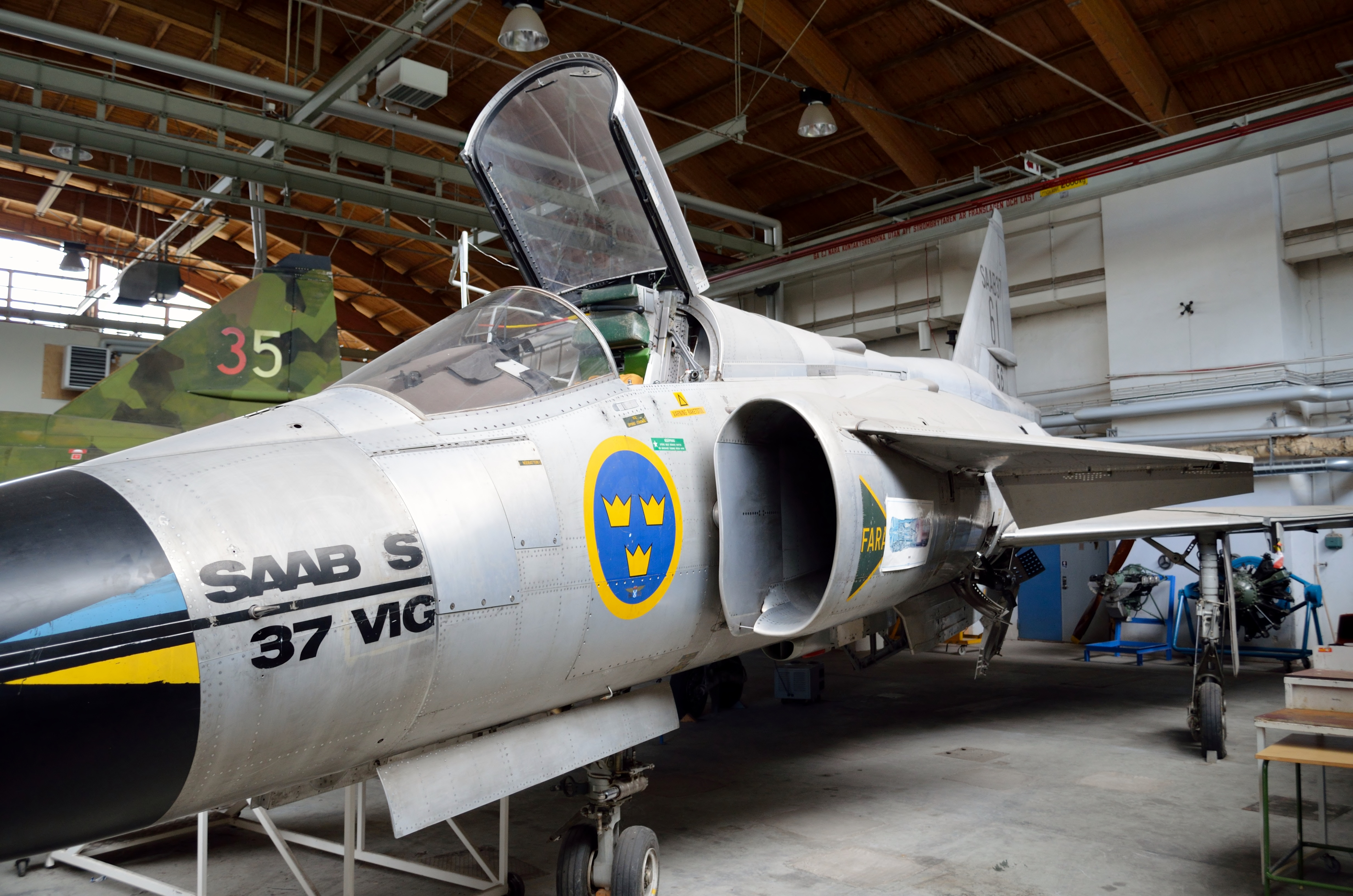 Saab 37 Viggen vid Västerås flygmuseum. Denna individ är ursprungligen en AJ 37 Viggen, men ombyggd till provflygplan 37-6 och fick beteckningen 37-61. Totalt togs det fram åtta individer i utprovningsprogrammet till JA 37 Viggen.